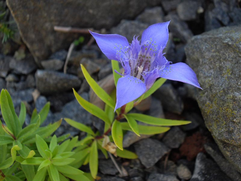 Gentiana paradoxa